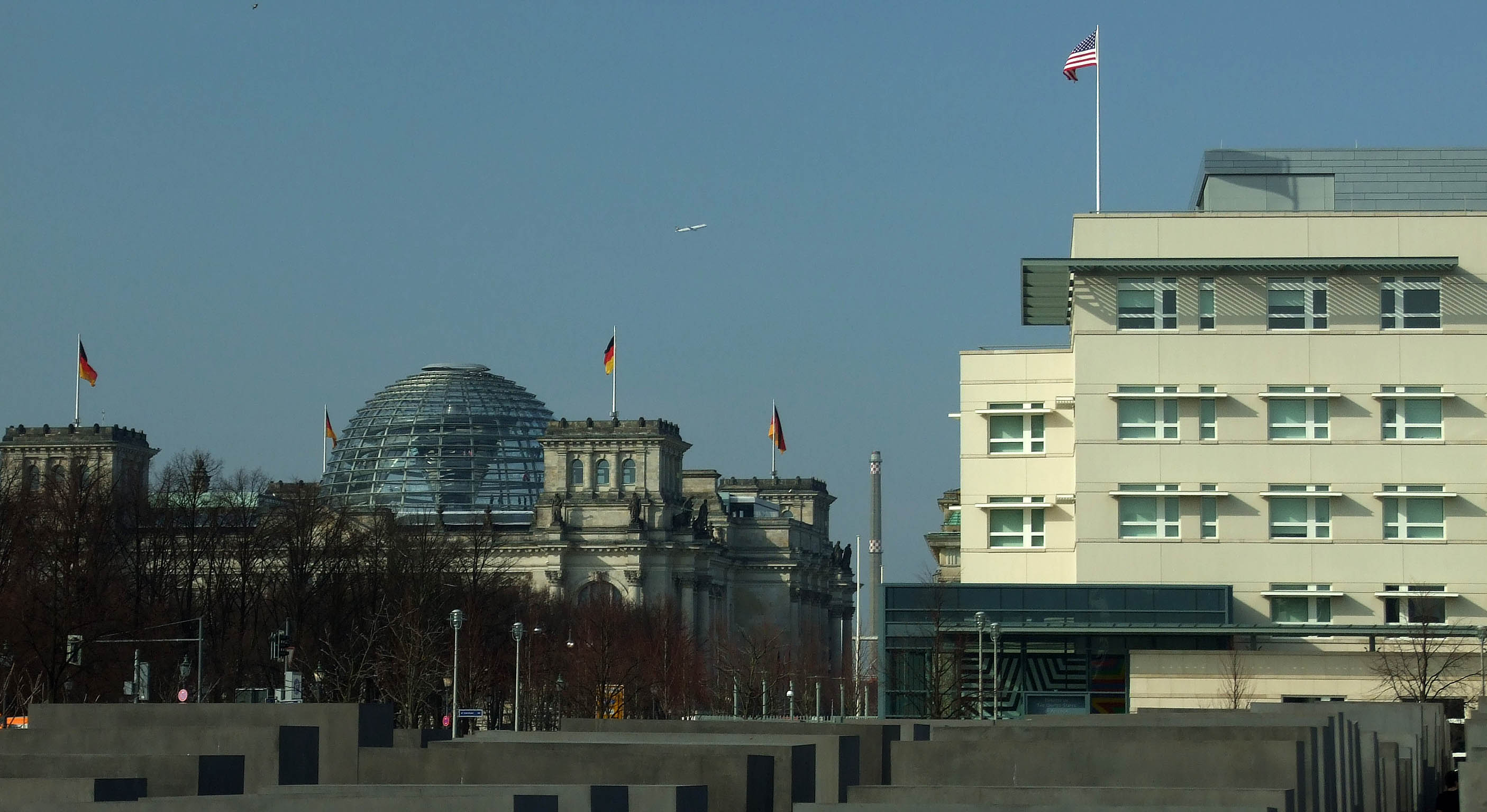 Amerikanische Botschaft in Berlin in Nachbarschaft zum Denkmal für die ermordeten Juden Europas und zum Reichstagsgebäude